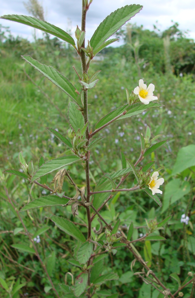 Sida rhombifolia L. - MALVACEAE - Parque Vivencial Asa Norte - Brasília - Distrito Federal - Brasil.